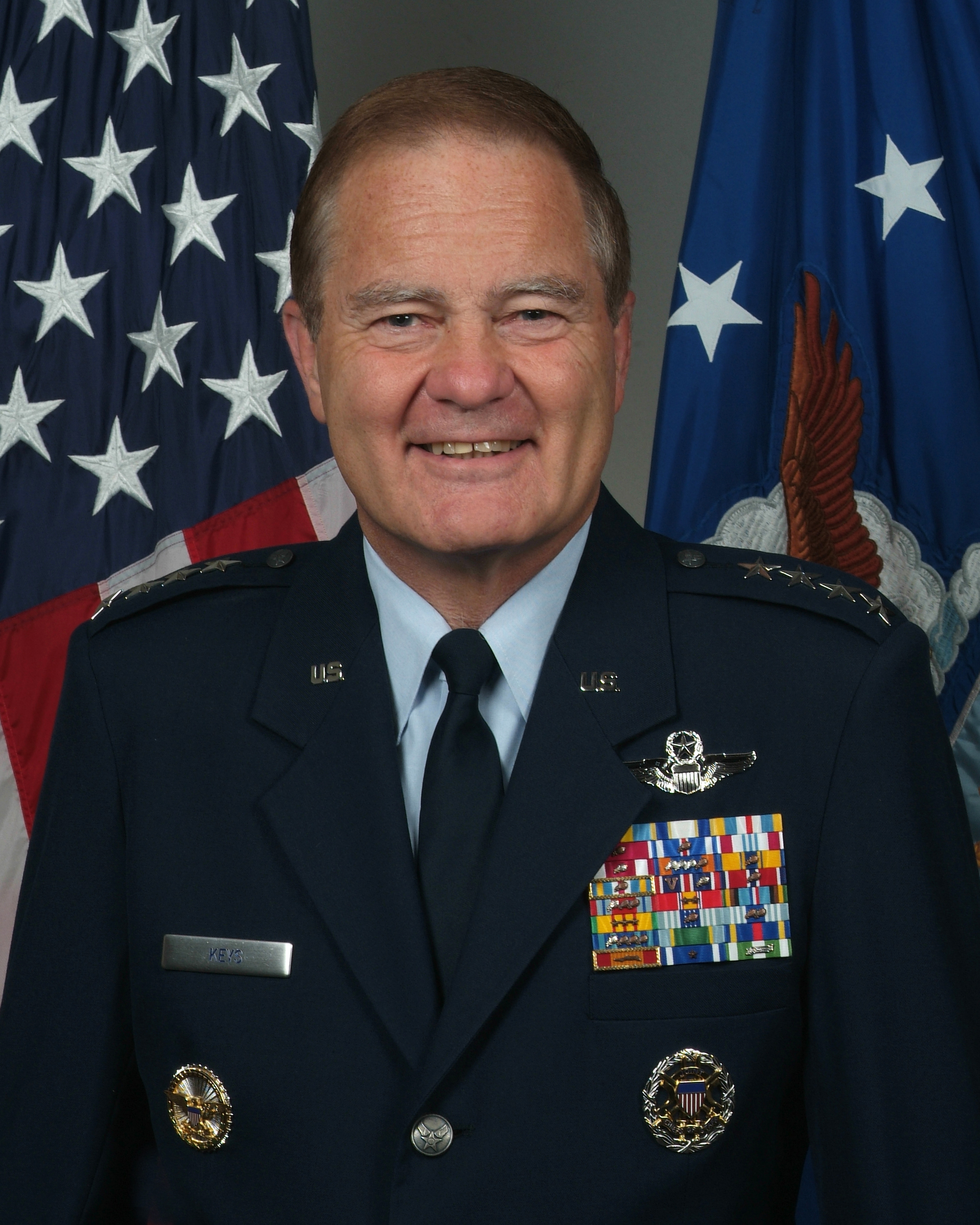 USAF General Ronald Keys